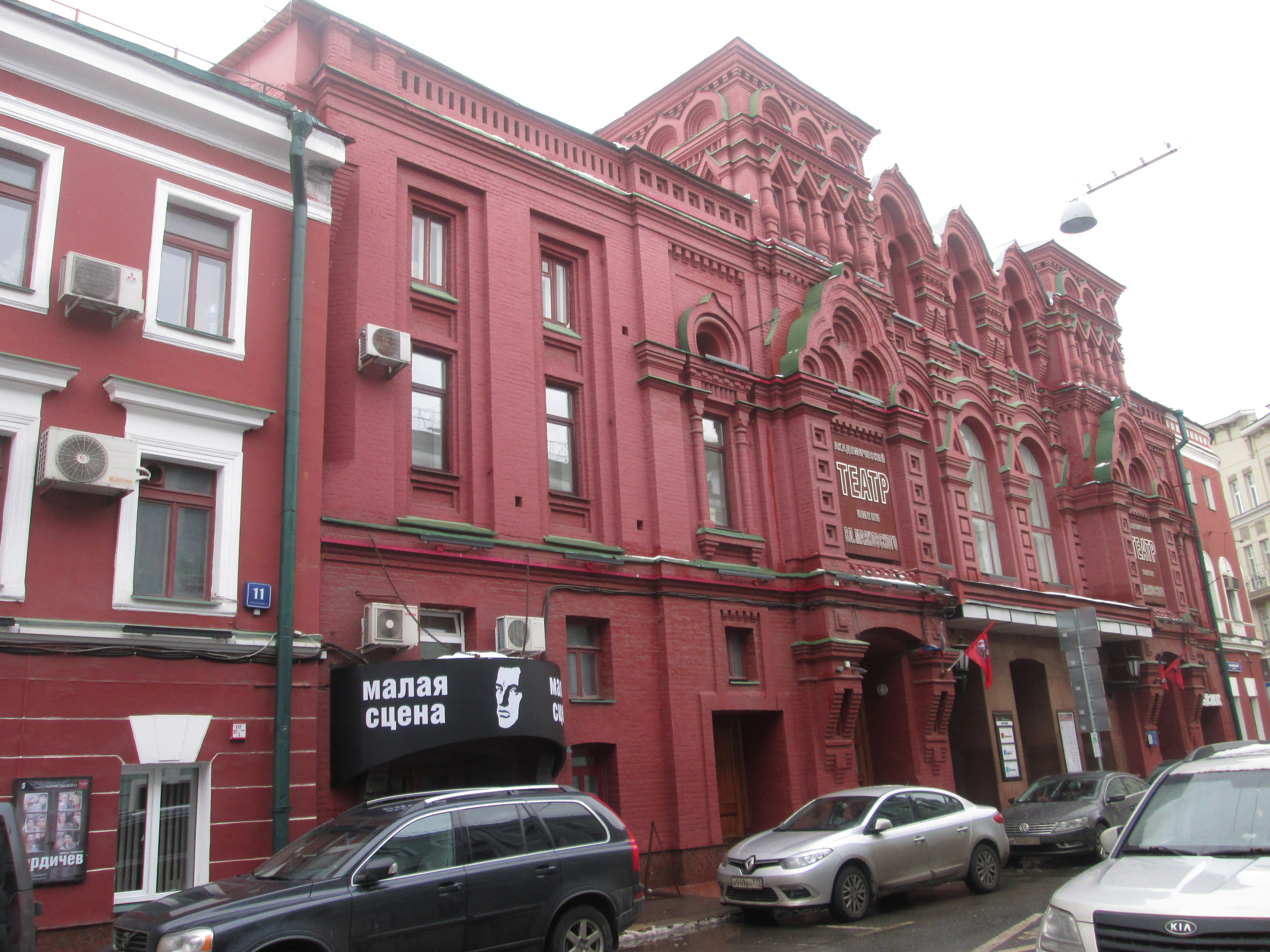 Городская усадьба (Глебовых-Стрешневых): Никитская Б. ул., дом 19, Пресненский, Центральный округ, Москва